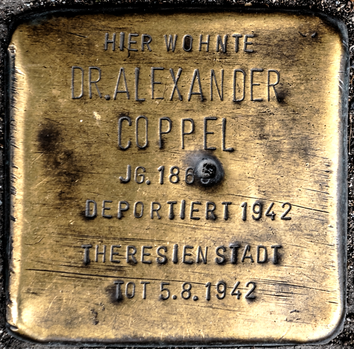 Stolpersteine in Solingen